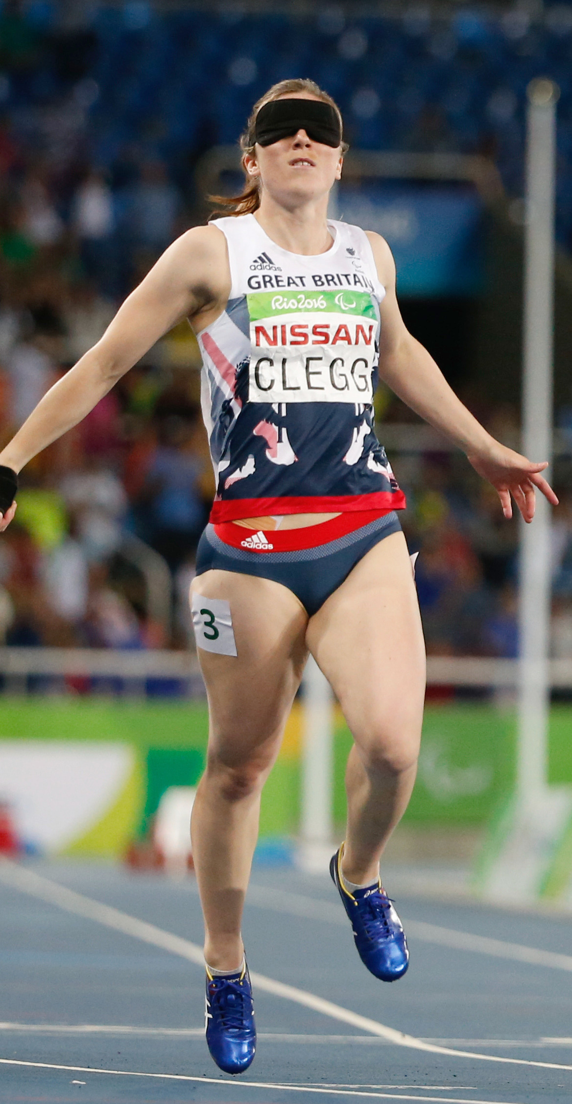 Rio de Janeiro - Brasileira Terezinha Guilhermina disputa final dos 100m T11 ao lado da britânica Libby Clegg, que levou ouro, nos Jogos Paralímpicos Rio 2016, no Estádio Olímpico. (Fernando Frazão/Agência Brasil)